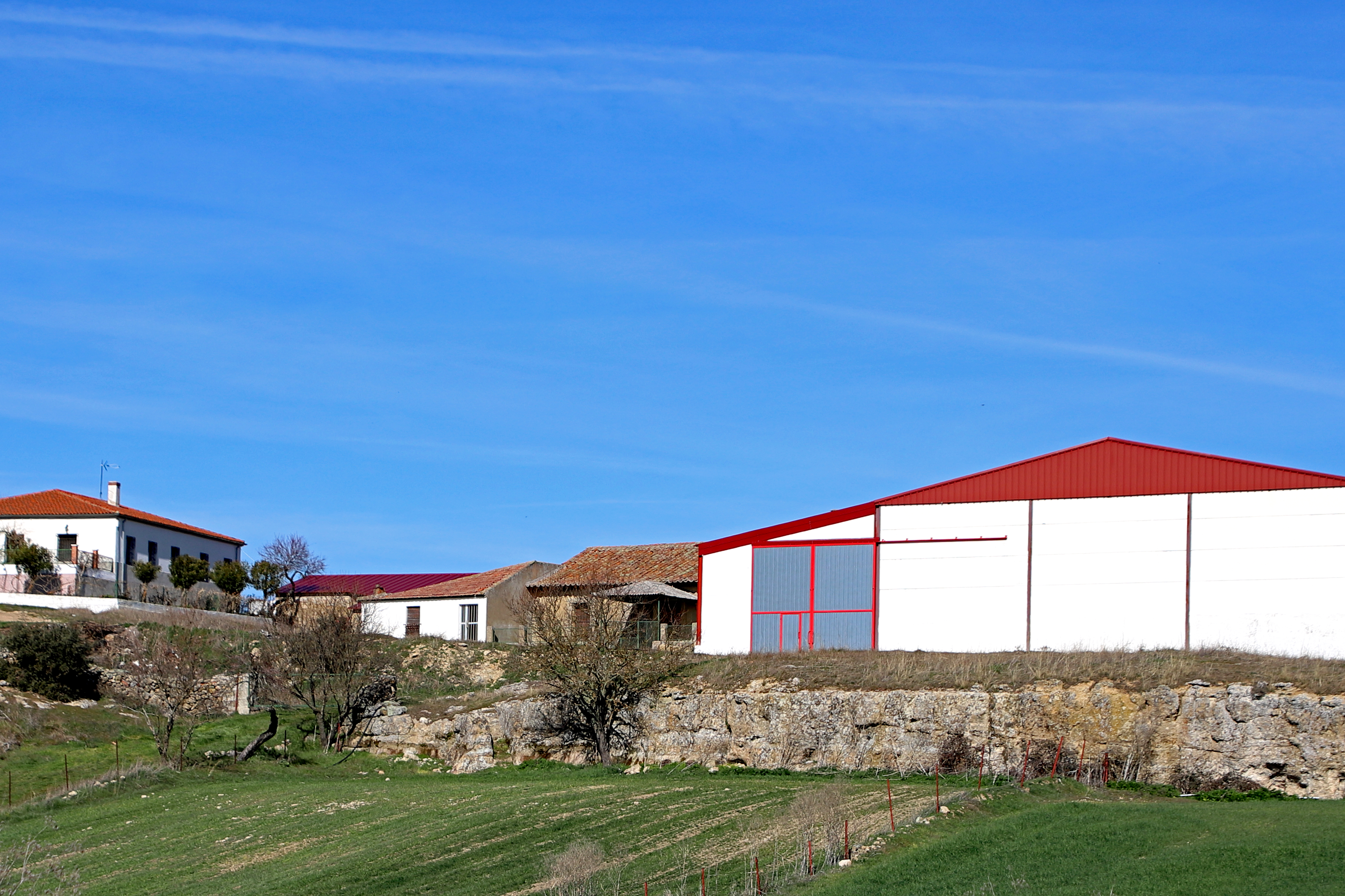 Miranda de Pericalvo es una localidad que pertenece al municipio de Galindo y Perahuy, comarca de Campo de Salamanca, en la provincia de Salamanca.